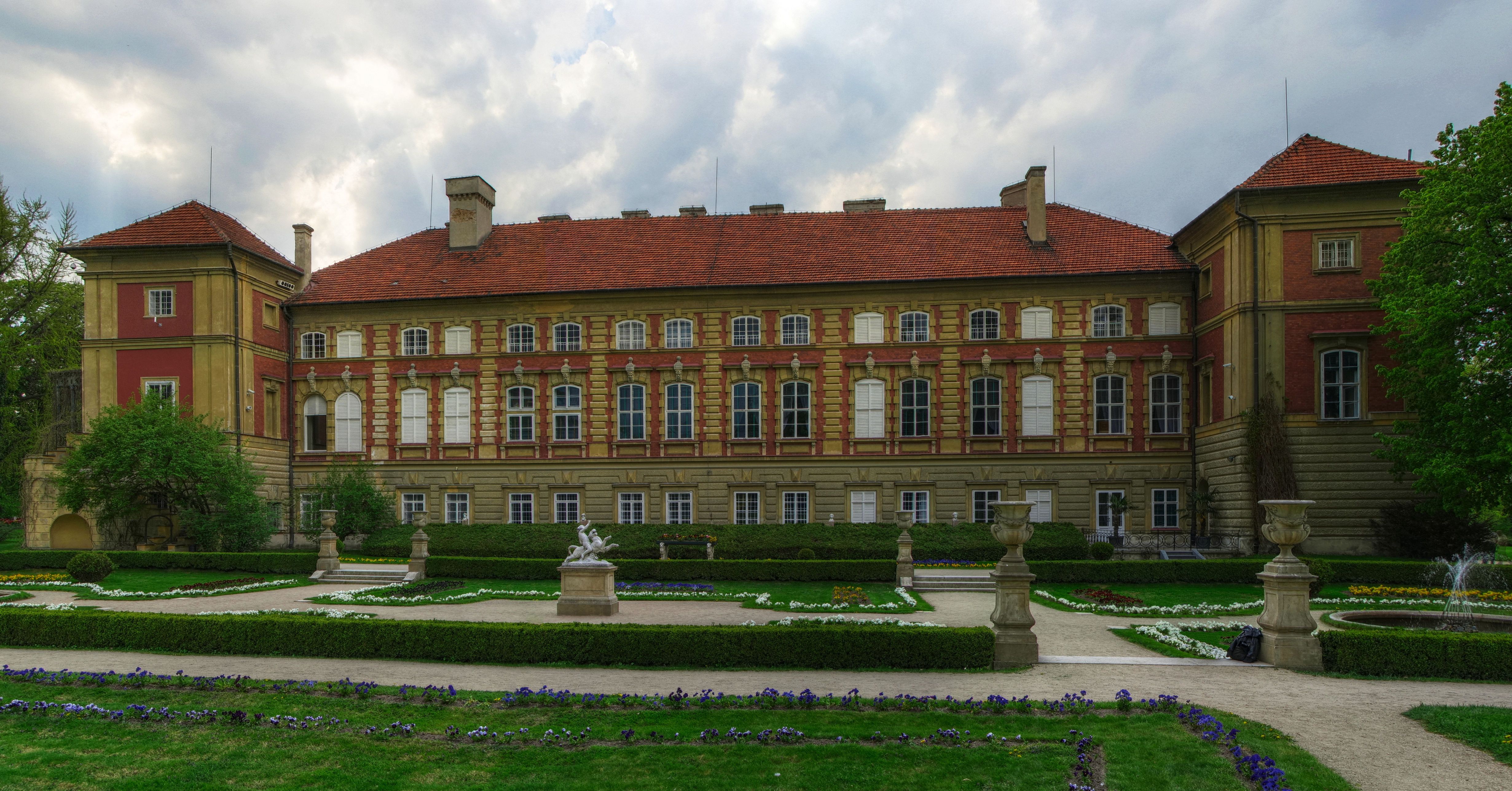 Łańcut - Zamek Lubomirskich i Potockich, widok od strony Ogrodu Włoskiego